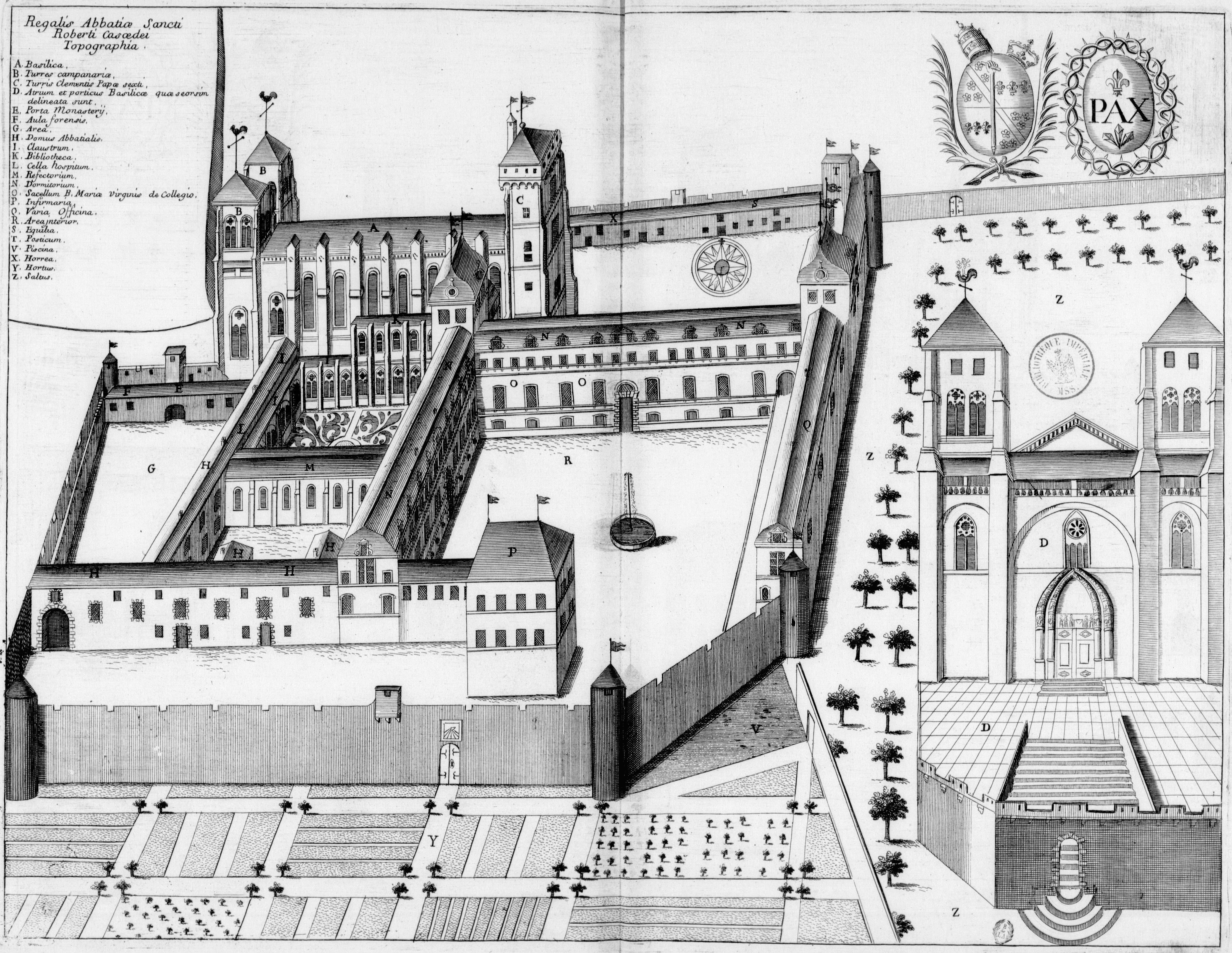 Planche gravée du 17ème siècle représentant l'abbaye de la Chaise-Dieu, en France, dans le livre Monasticon Gallicanum.